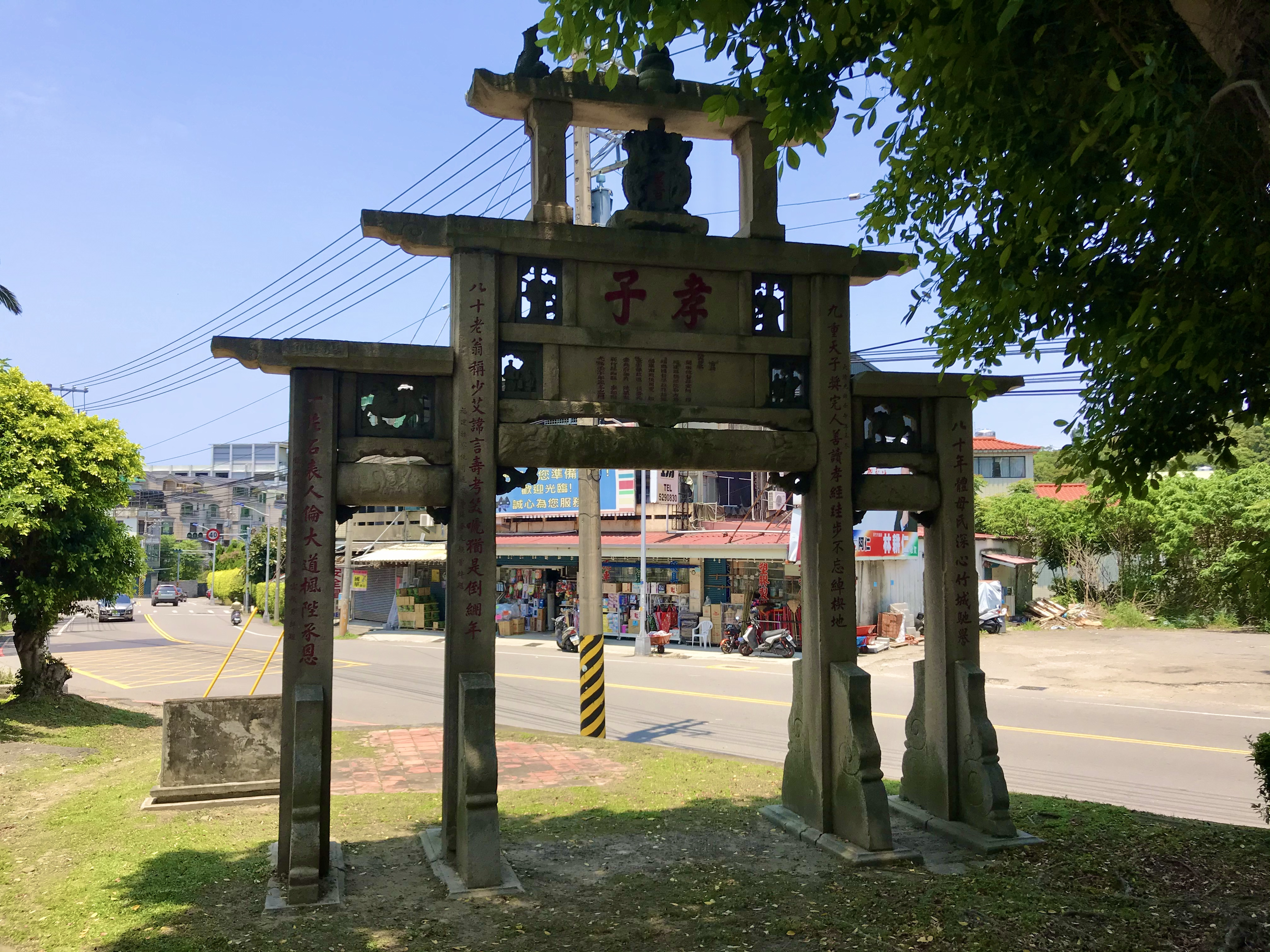 中文（台灣）: 李錫金孝子坊背面照